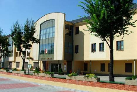 Urząd Miejski w Słubicach, ul. Akademicka